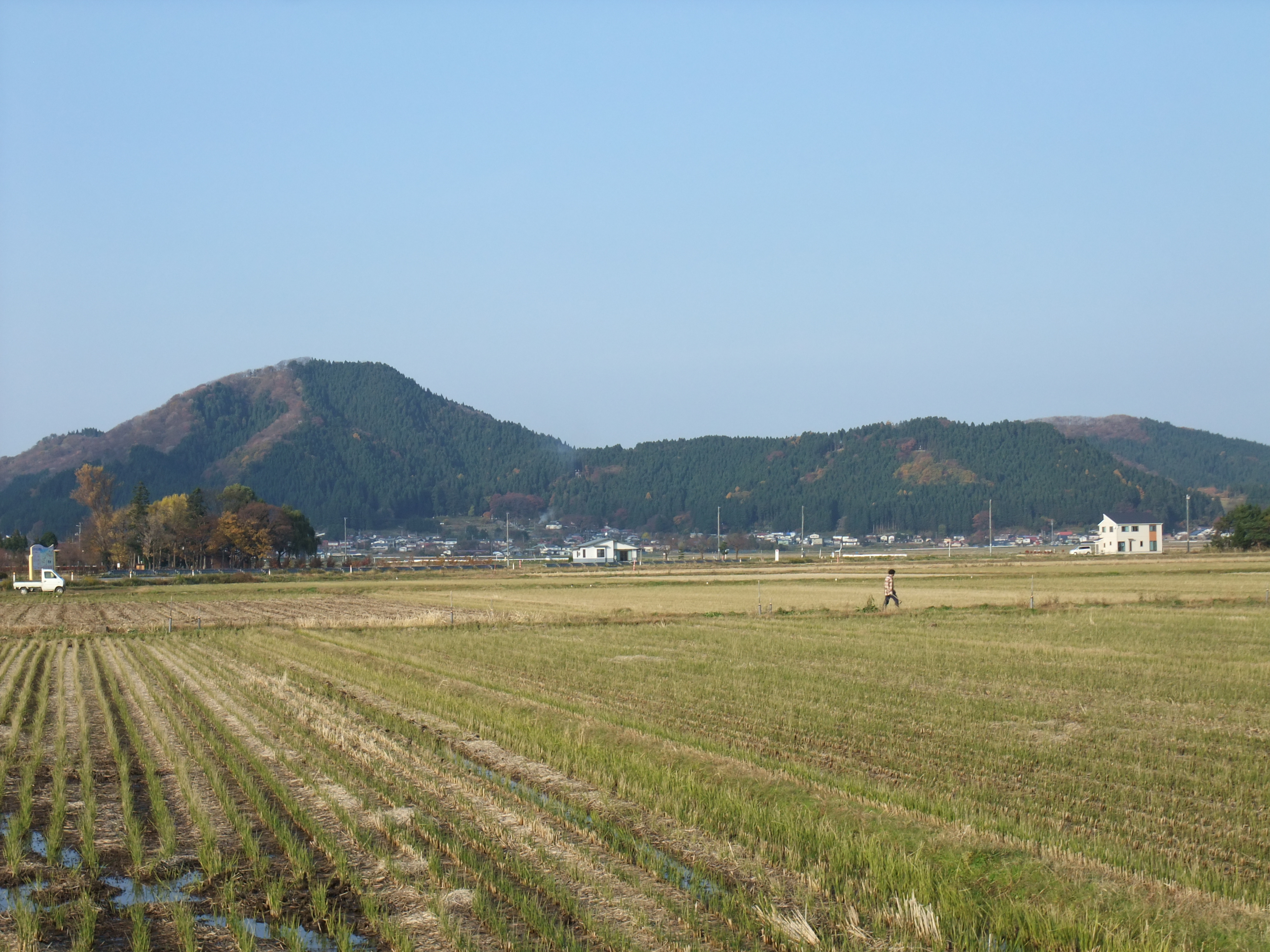 高岳山 (秋田県) 右の丘陵地は浦城跡